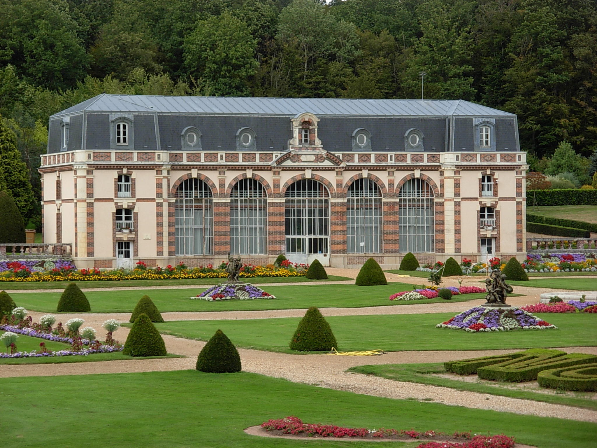 Orangeraie du château des Vaux (Eure-et-Loir)